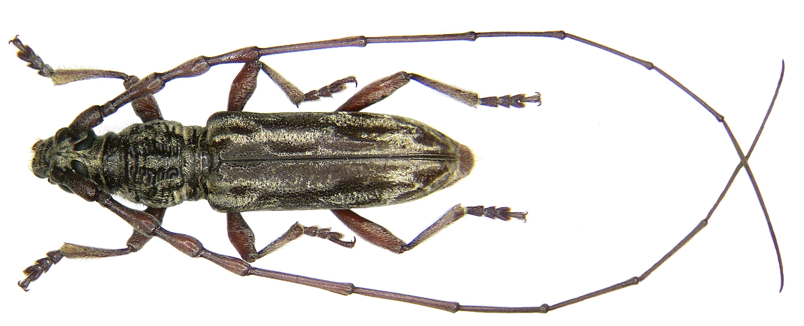 Familie: Cerambycidae Grösse: 17 mm Fundort: Malaysia, Borneo, Sabah leg. F. bin Eying; det. A.Weigel Foto: U.Schmidt, 2007